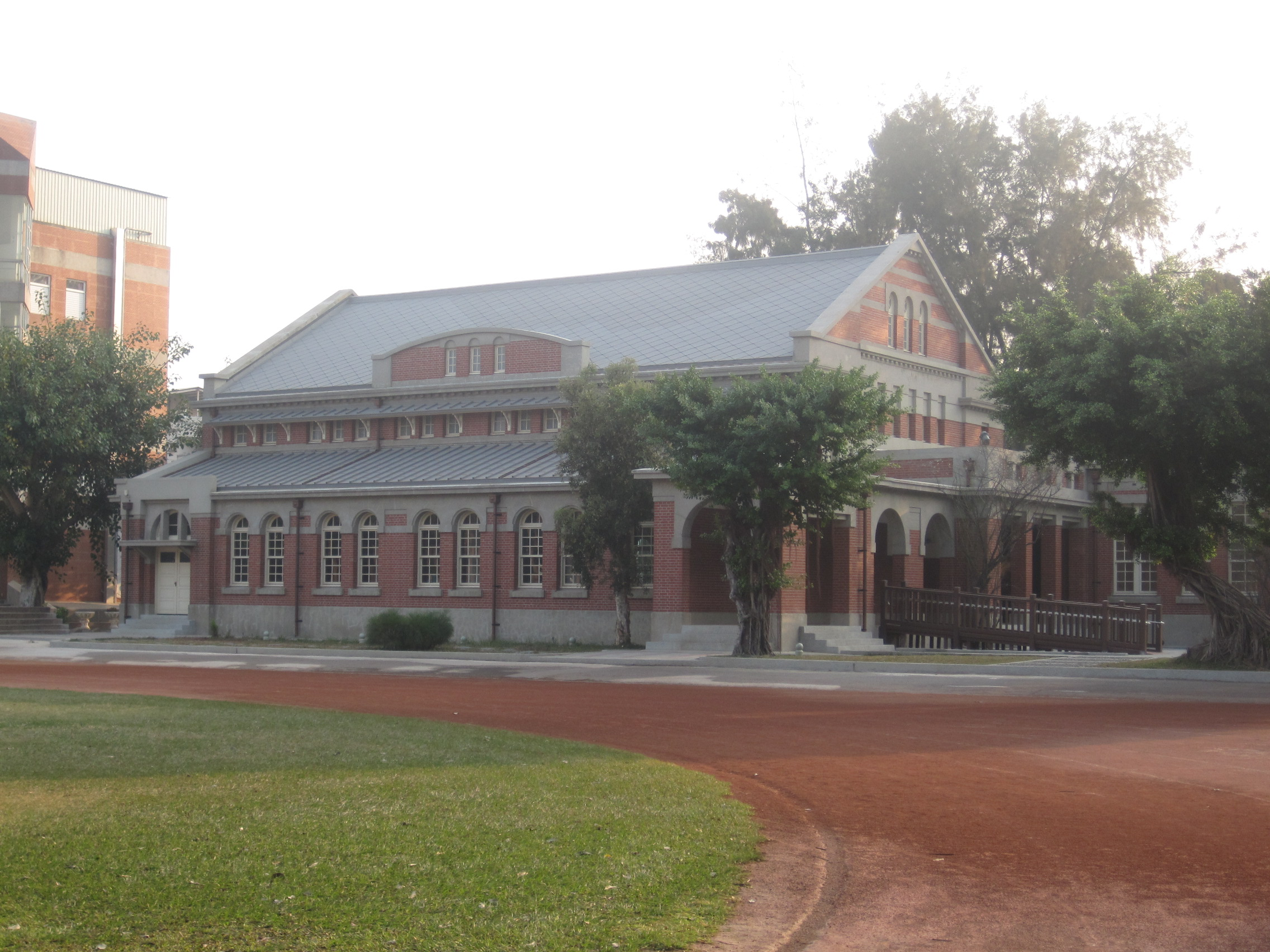 整修完成後的原臺南中學校講堂